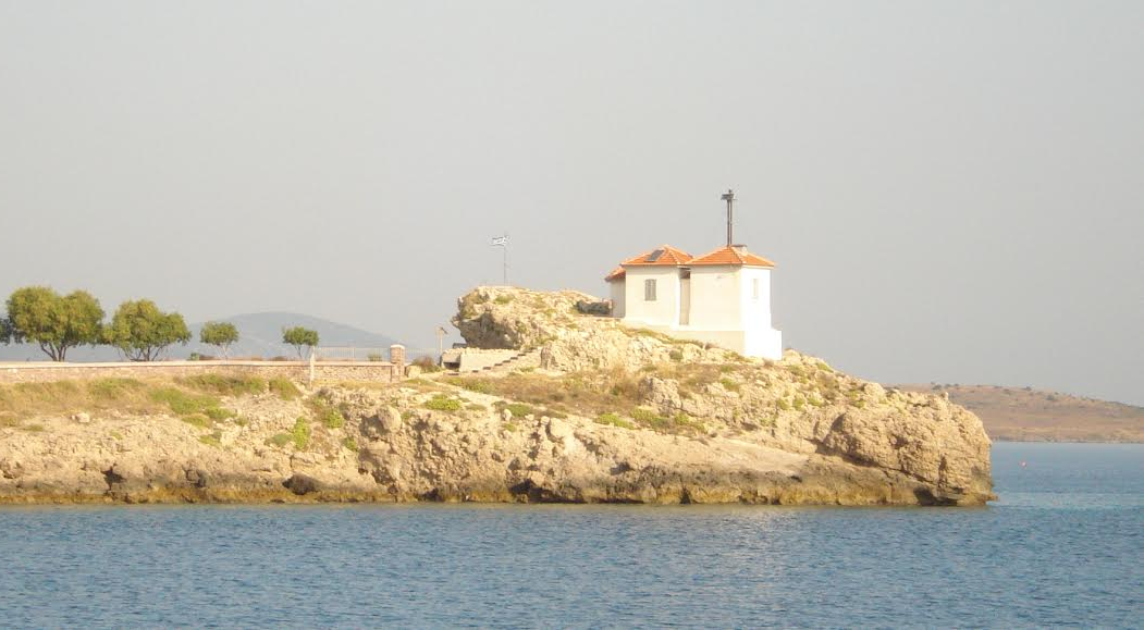 Ο φάρος της Φυκιότρυπας